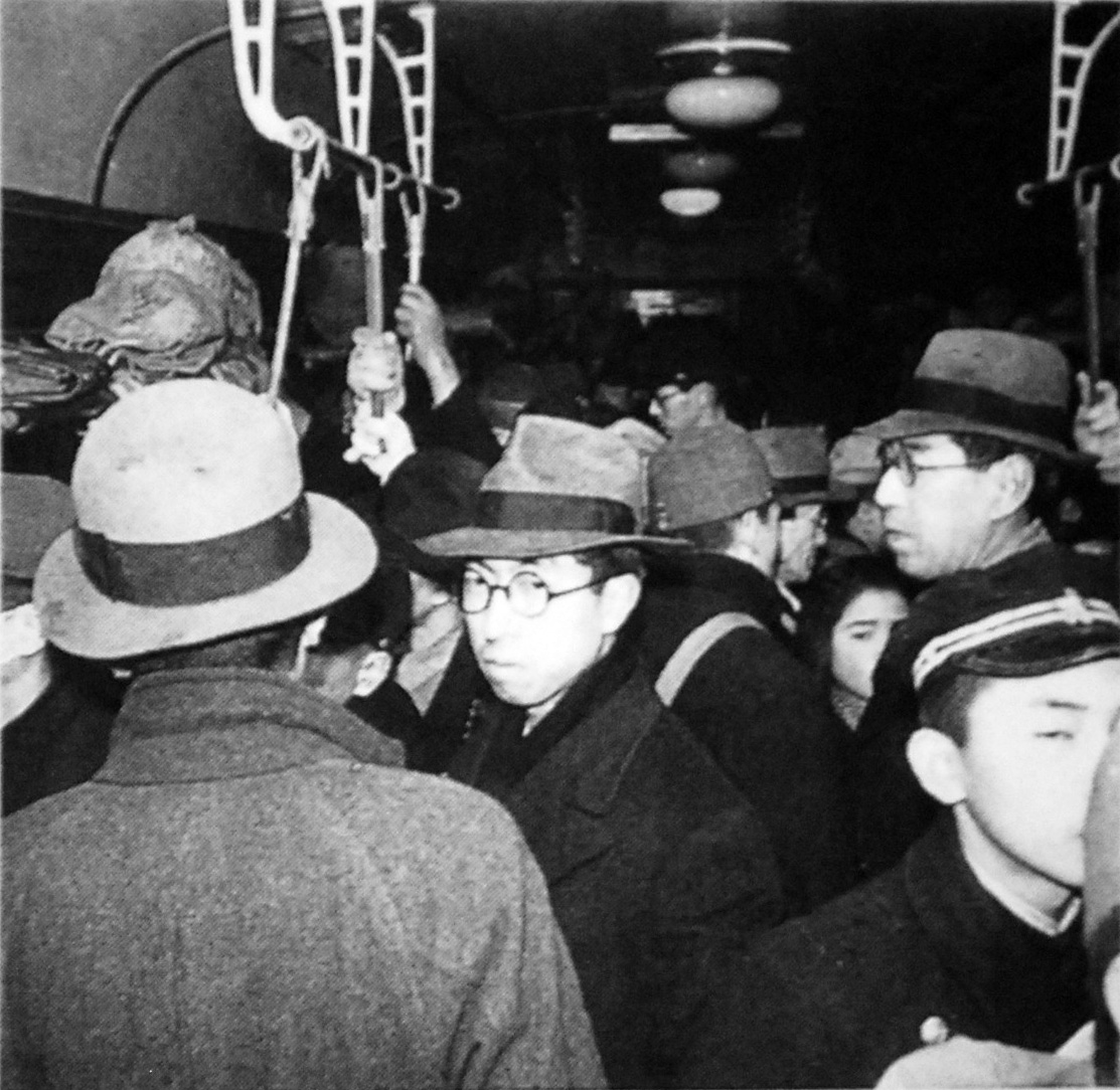 国鉄横須賀線で、満員電車に乗車する三笠宮崇仁親王(Prince Mikasa-no-miya Takahito)